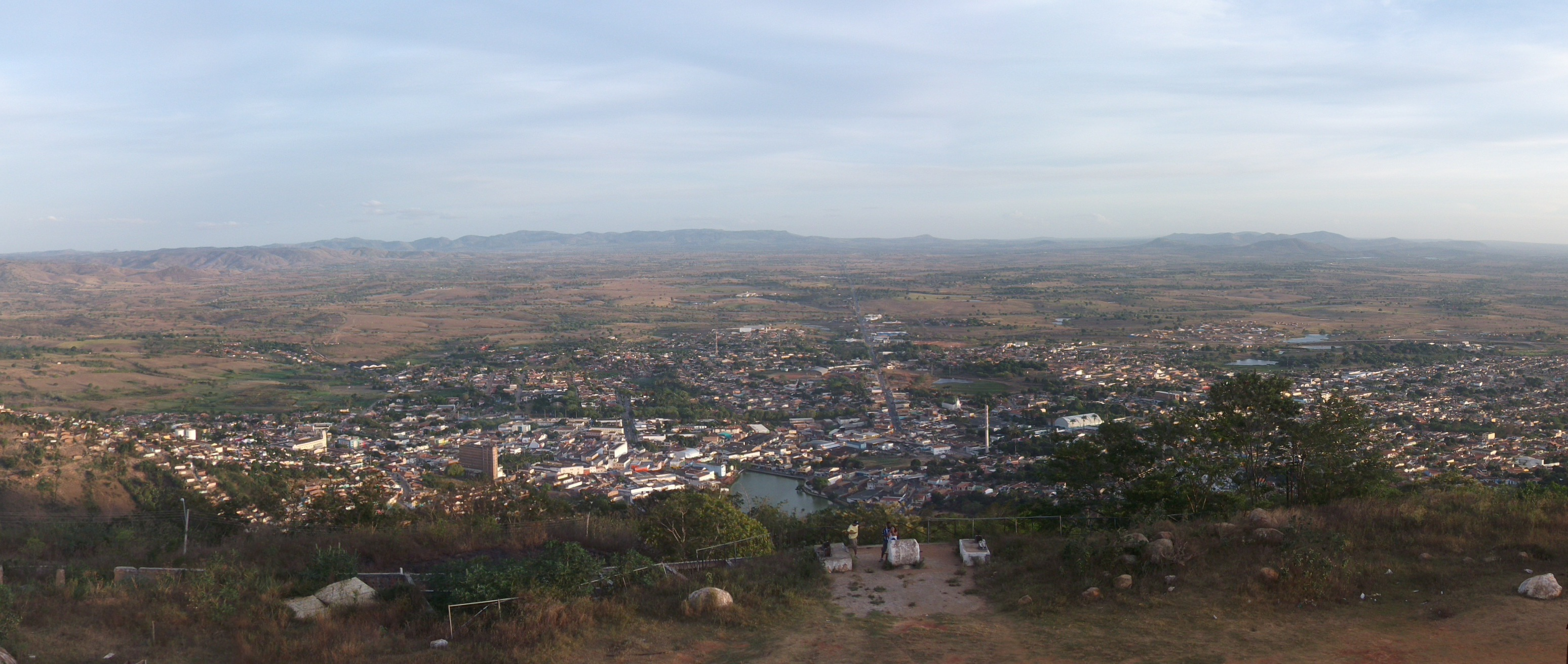 Vista da cidade de Palmeiras dos Índios — Patrimônio histórico do Brasil.